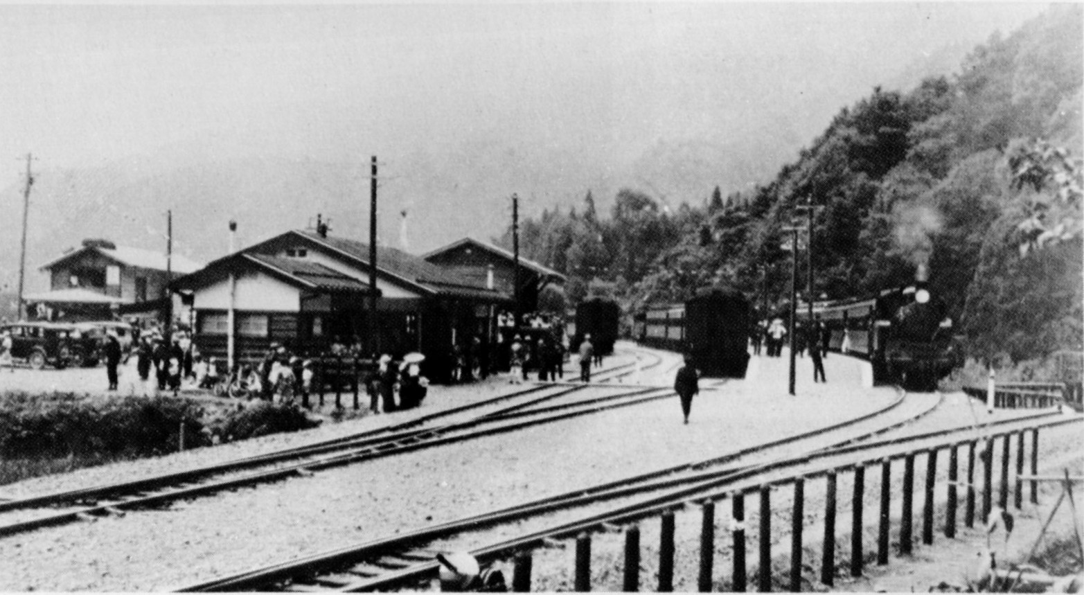 越美南線北濃駅の開通臨時列車(昭和9年8月)(岐阜県群上市)